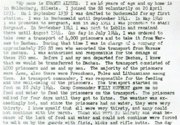 Ausschnitt aus einer Aussage von Alfred Kramer im Vorfeld des Dachauer Prozesses (englische Übersetzung)